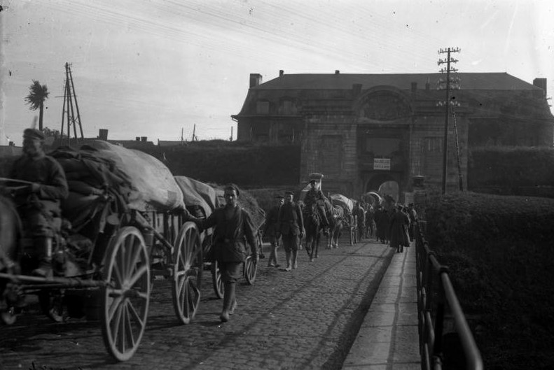 Frankreich, Maubeuge, deutsche Besatzung Frankreich-Nord, Maubeuge.- Deutsche Besatzung. Soldaten mit Pferdewagen aus dem Porte du Mons kommend